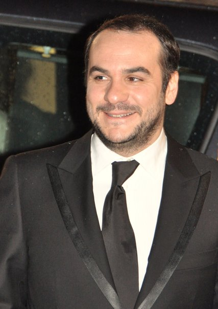 François-Xavier Demaison à la cérémonie des Césars 2010.